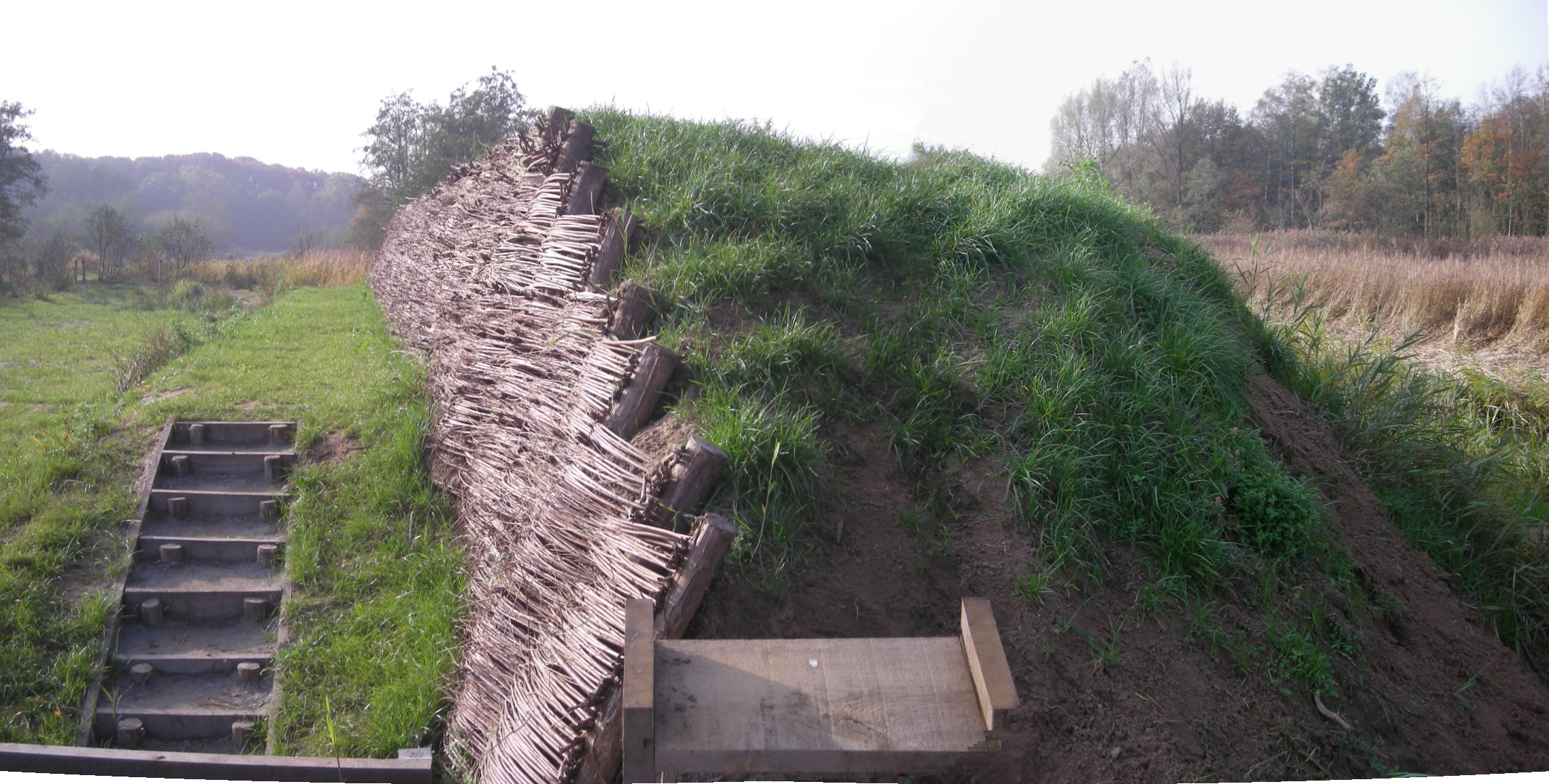 Bedmarlinie